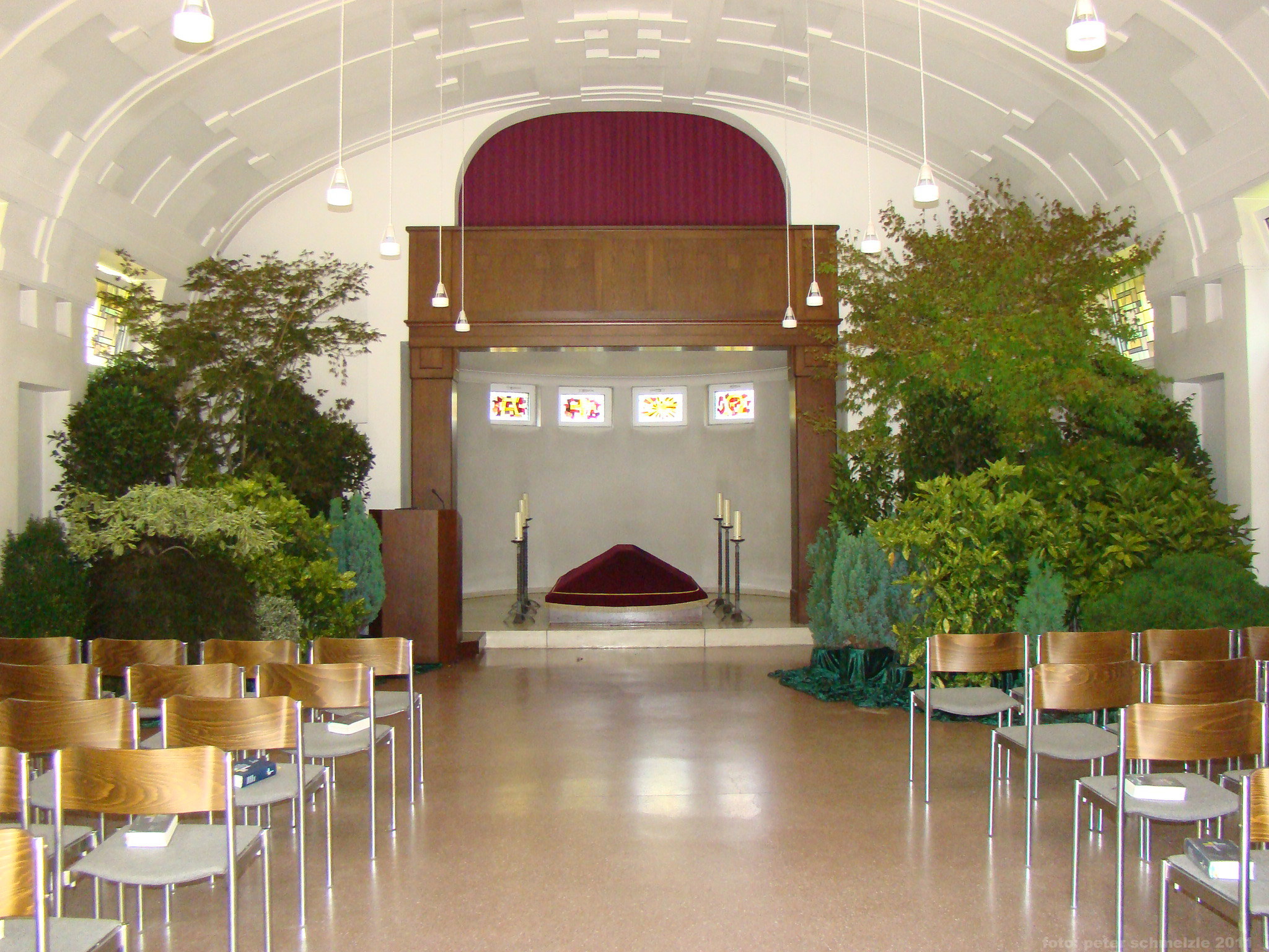 Krematorium auf dem Hauptfriedhof in Heilbronn, Foto: Peter Schmelzle 2011